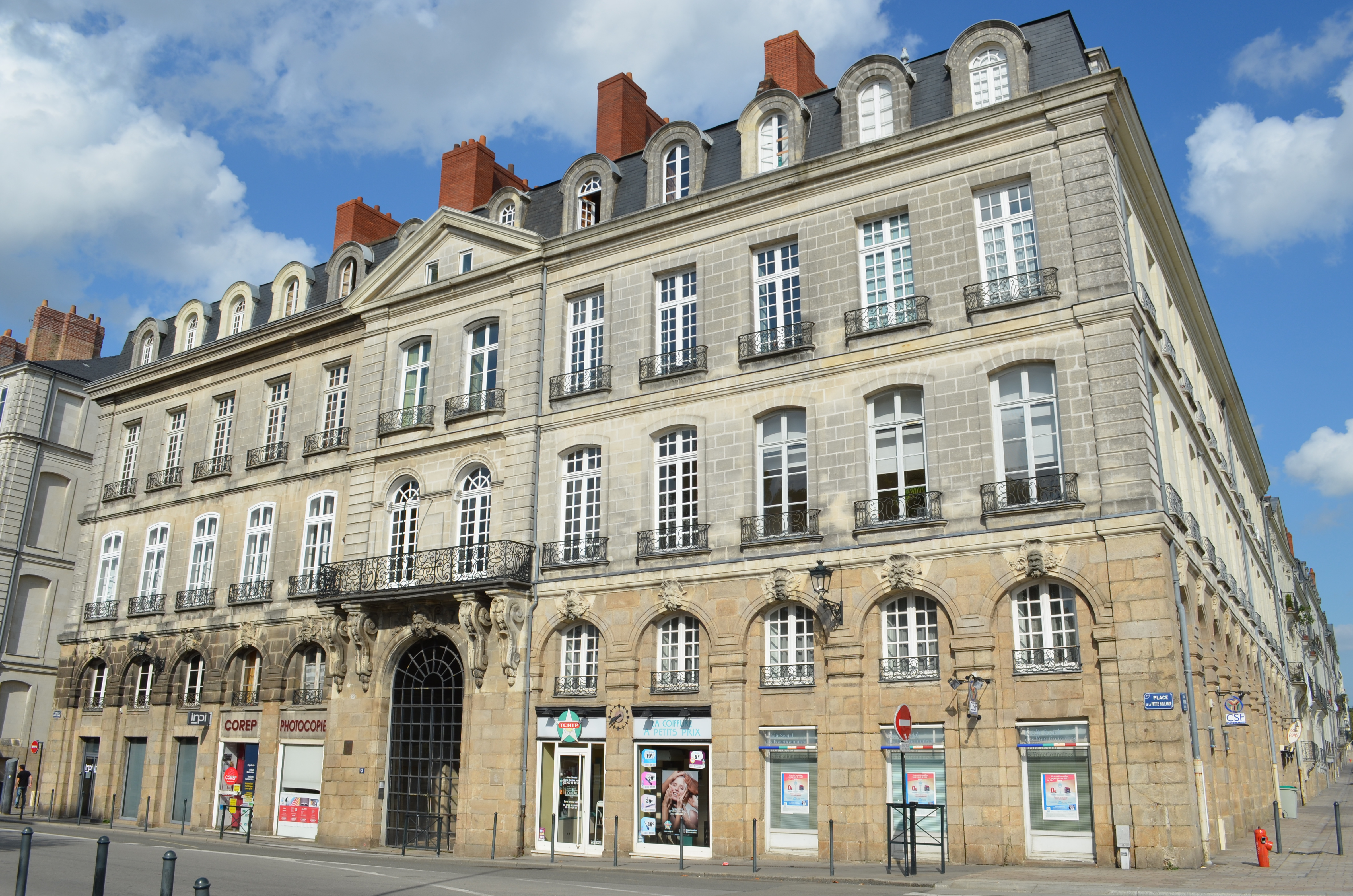 Hôtel Villetreux situé au 3 place de la Petite-Hollande, façades latérales sur la rue Kervégan et le quai Turenne - Nantes. .